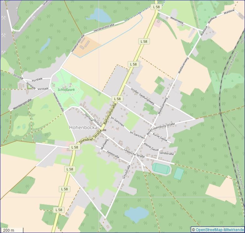 Übersichtsplan Straßen in Hohenbocka aus OpenStreetMap